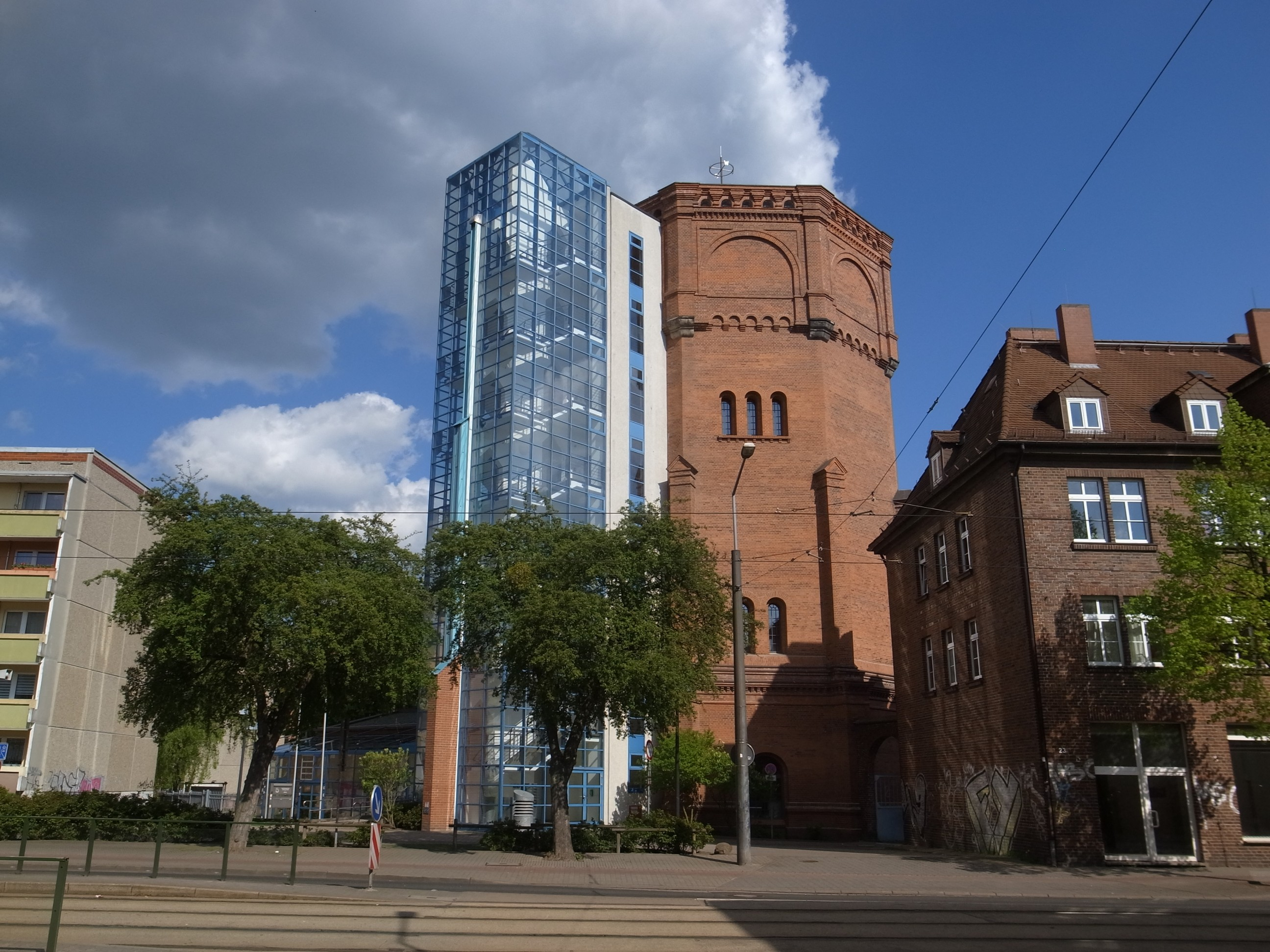 Dessau-Roßlau, Heidestraße 21, Alter Wasserturm (Baudenkmal im Denkmalverzeichniss Sachsen-Anhalt, Erfassungsnummer: 094 40095 000 000 000 000 [1])